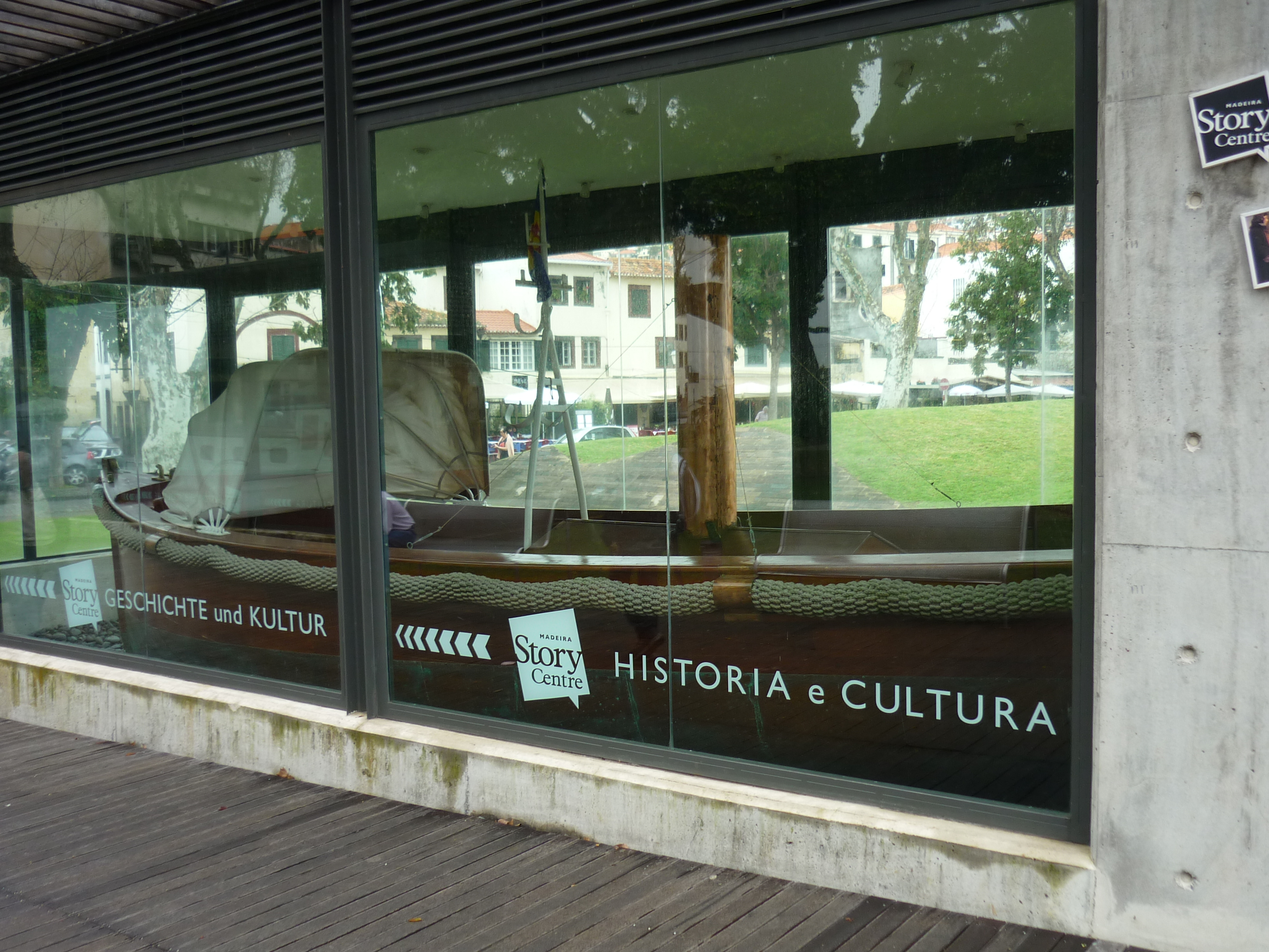 A Moszkitó (Mosquito) Funchalban (Madeira)